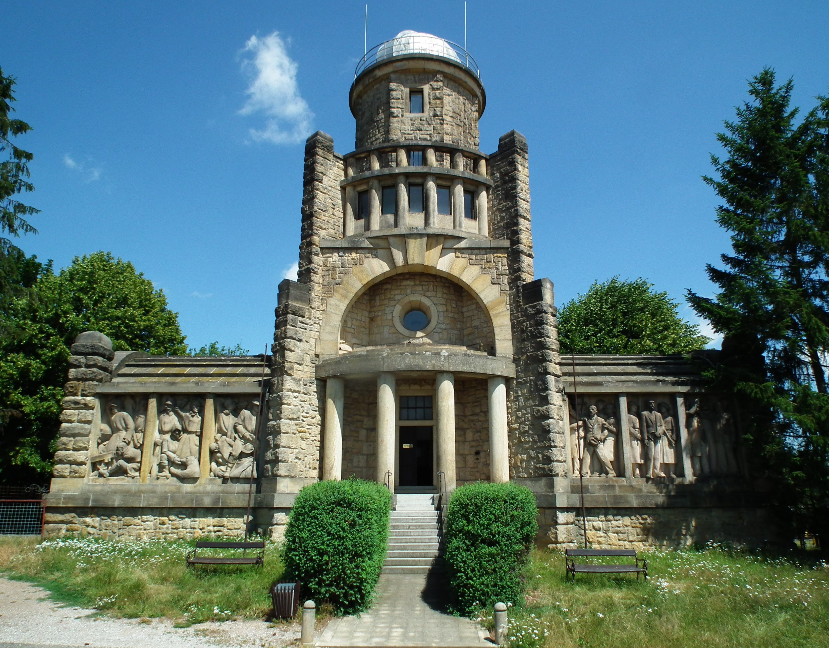 Masarykova věž samostatnosti - Horzyce.